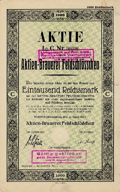 Abbildung einer Aktie der Feldschlösschen-Brauerei, Minden